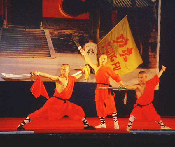 מופע של שאולין